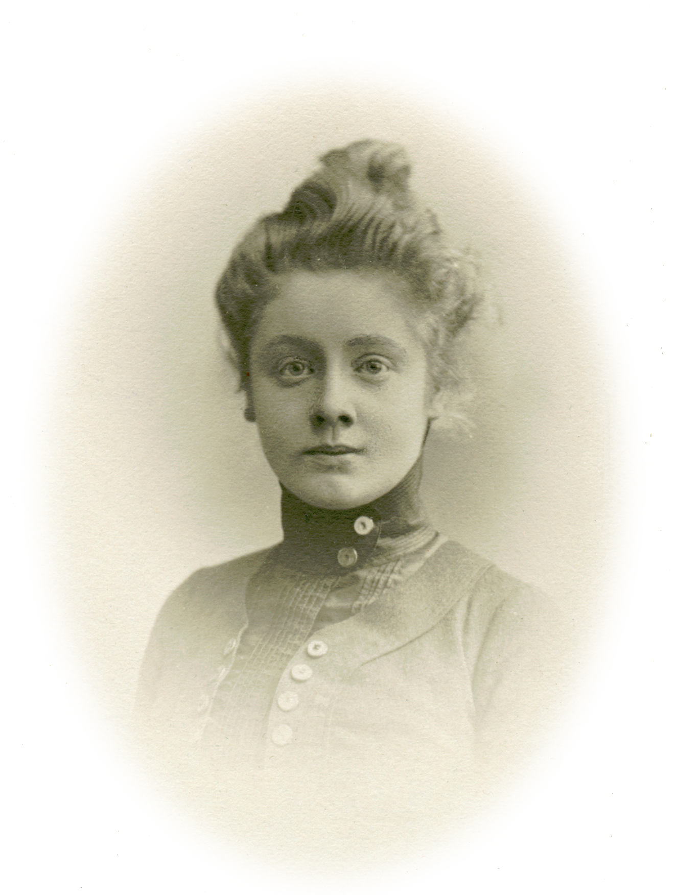 Lisa Håkansson, skådespelare vid Albert Ranfts sällskap, dramatiska avdelningen 1899-1900